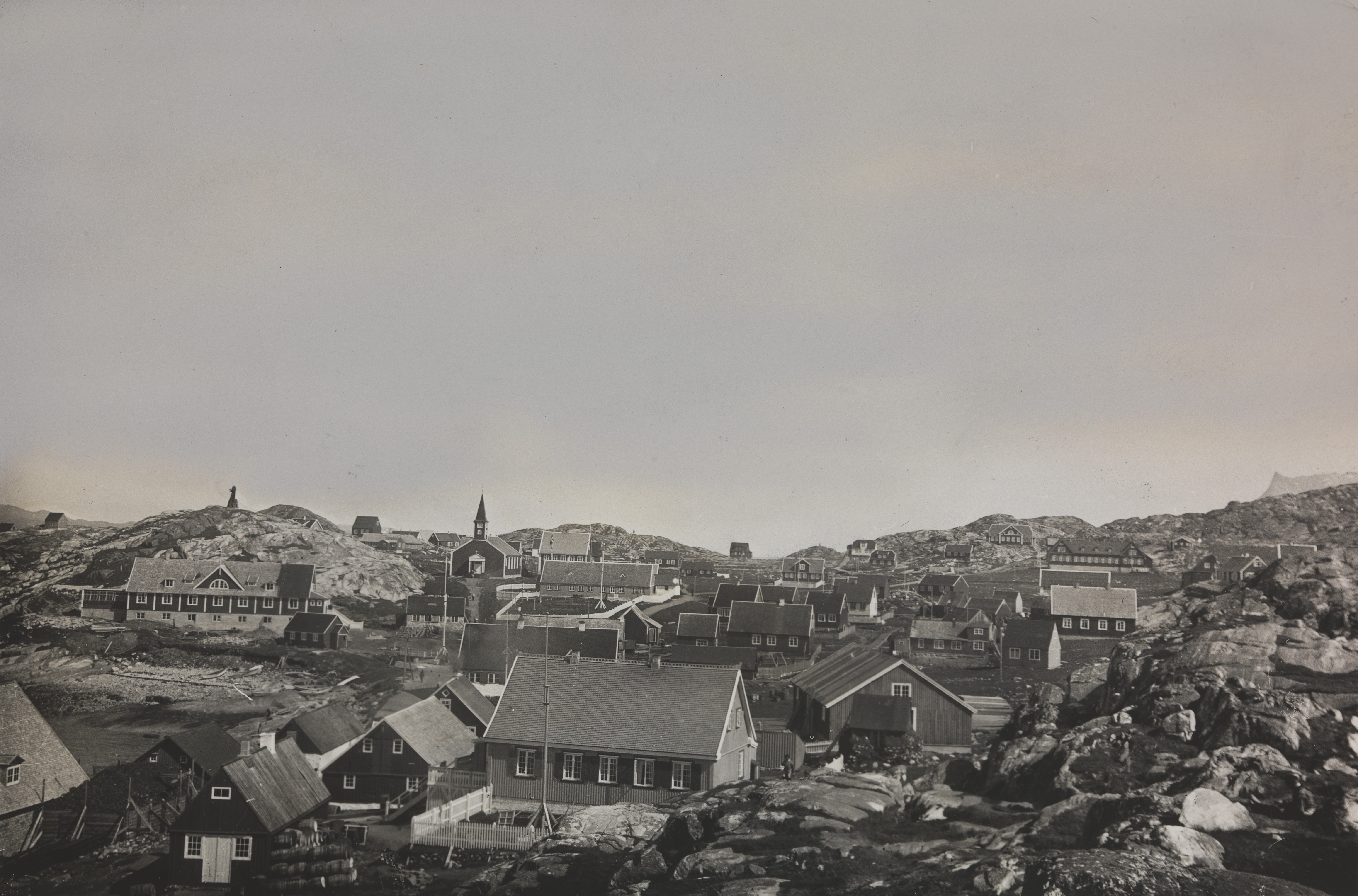 Utsikt over byen. Depicted place: Grønland, Godthåb (Nuuk)